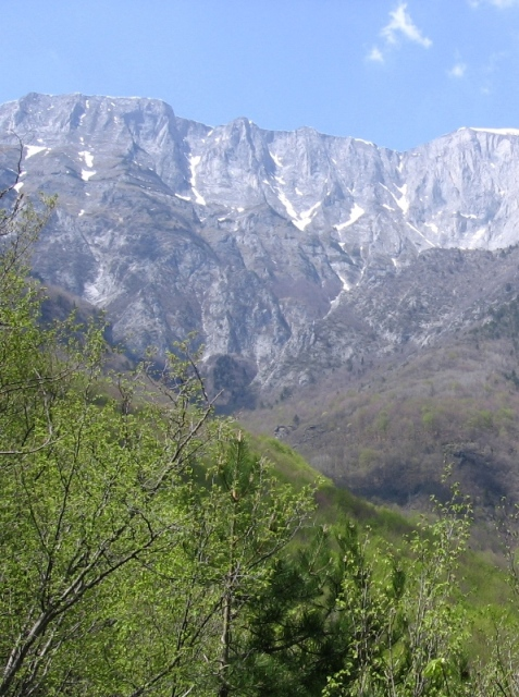 Solunska glava peak on Jakupica mountain in Macedonia